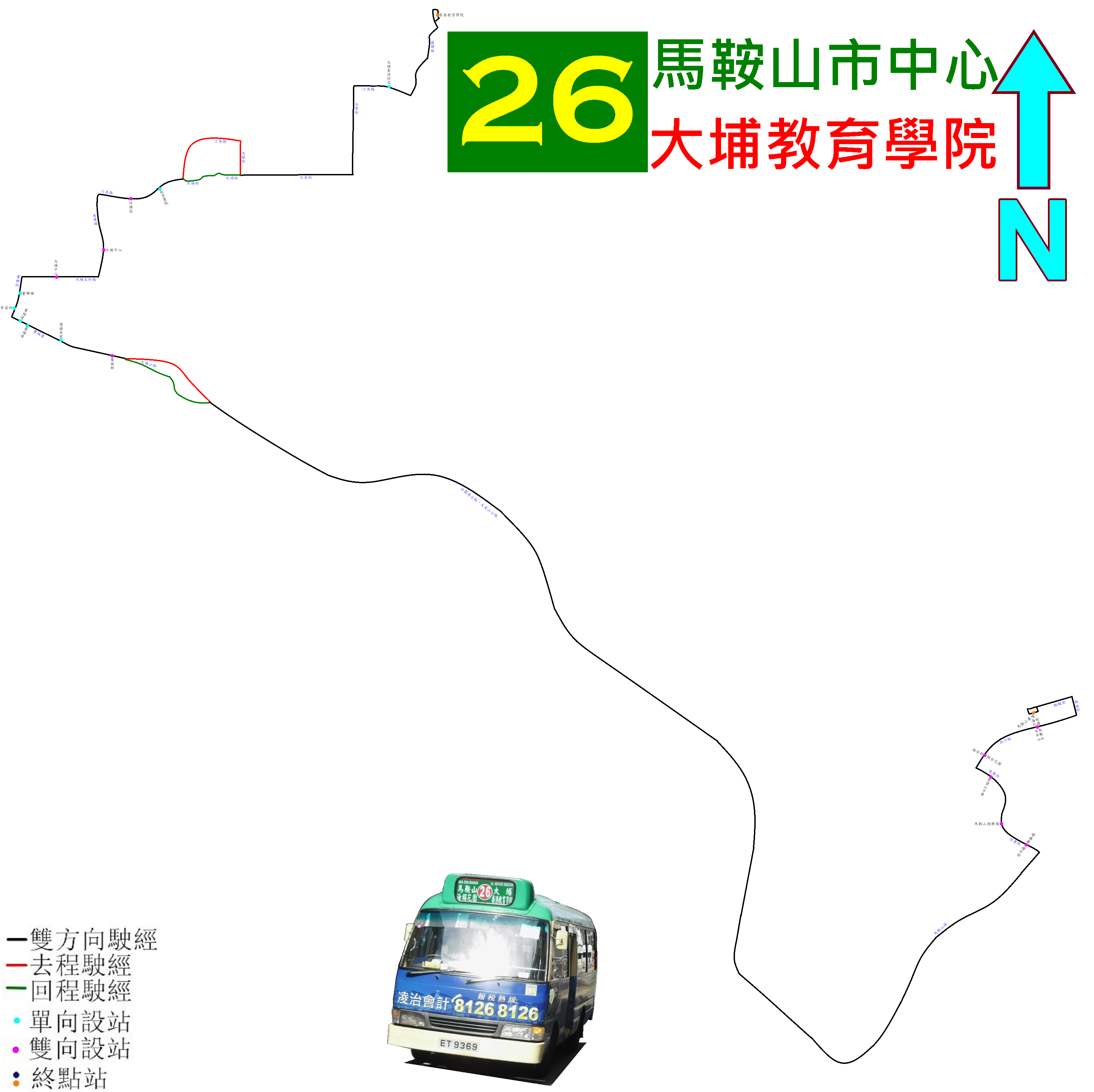 中文（香港）: 新界專線小巴26線的走線圖